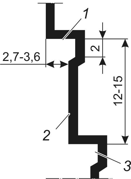 Фото